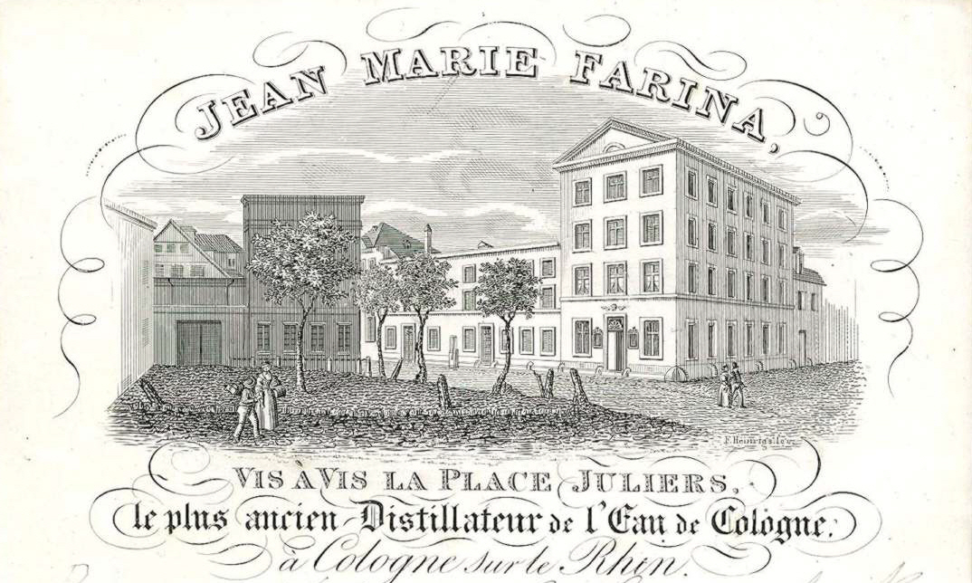 Casa Farina The Farina House in 1800.